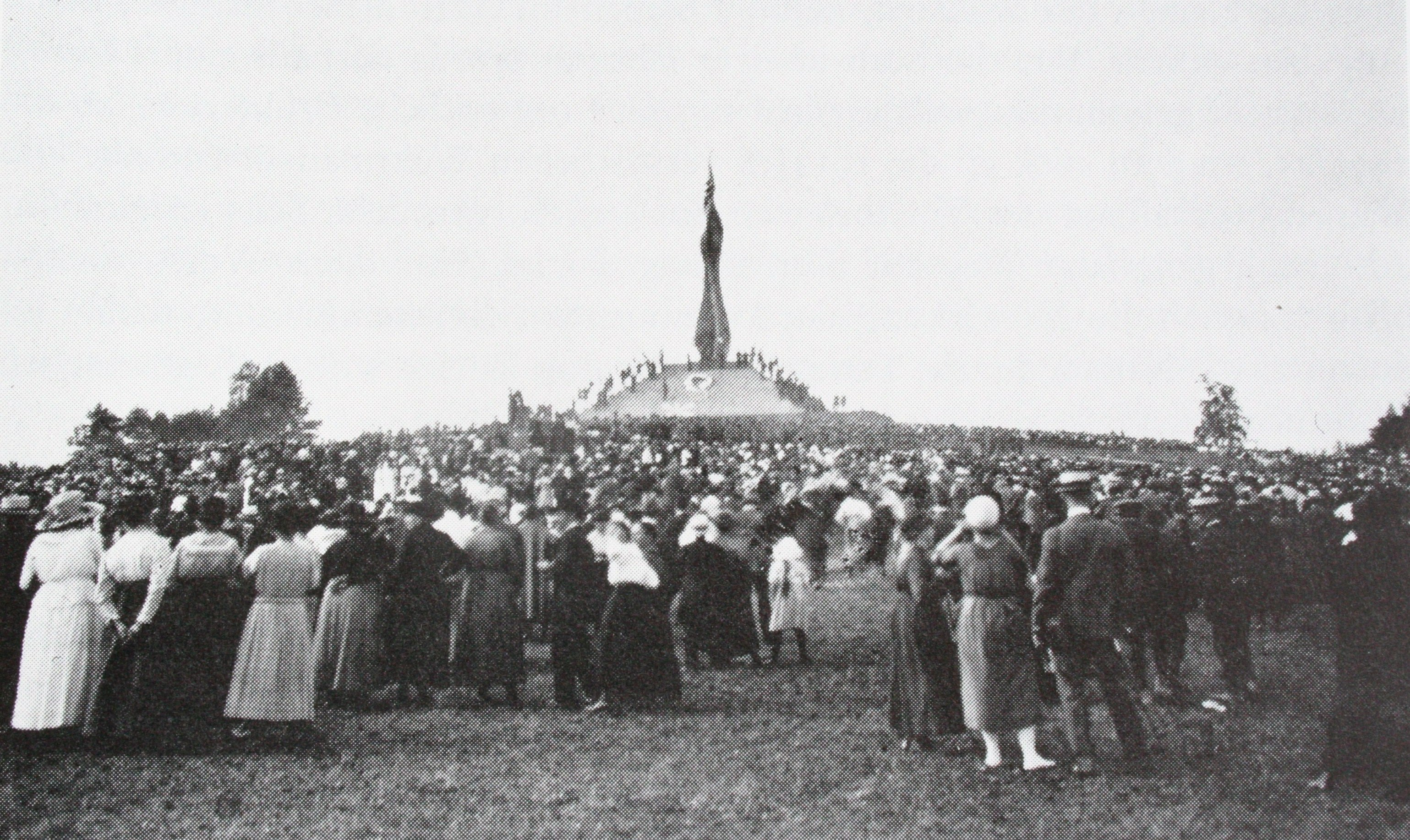 Einweihung des Forchdenkmals (Küsnacht ZH)